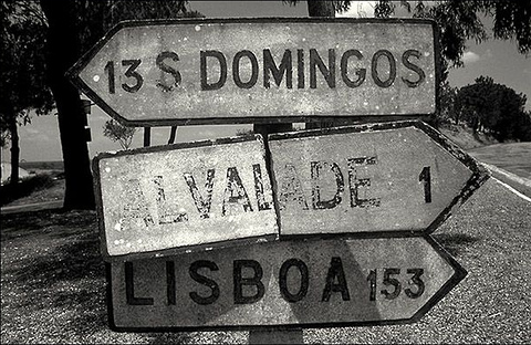 Alvalade Portugal